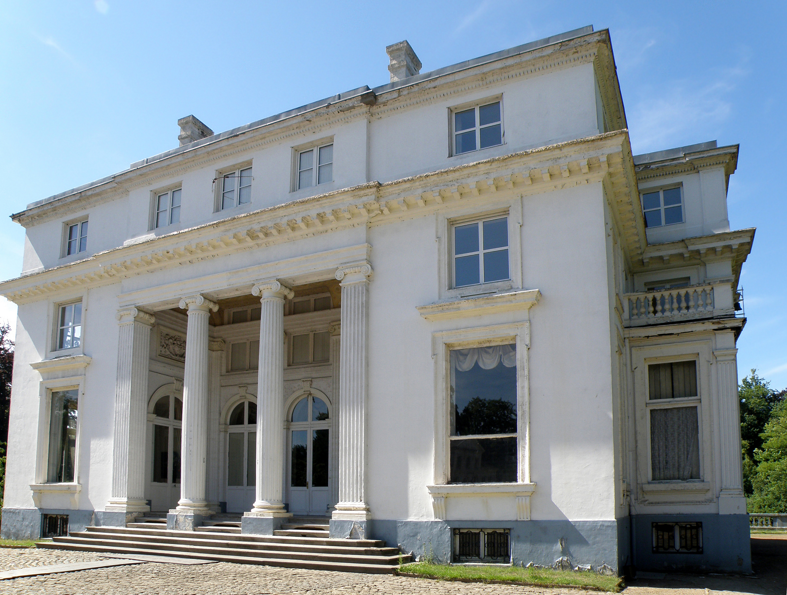 Edegem (prov. Antwerpen, België). Hof ter Linden.